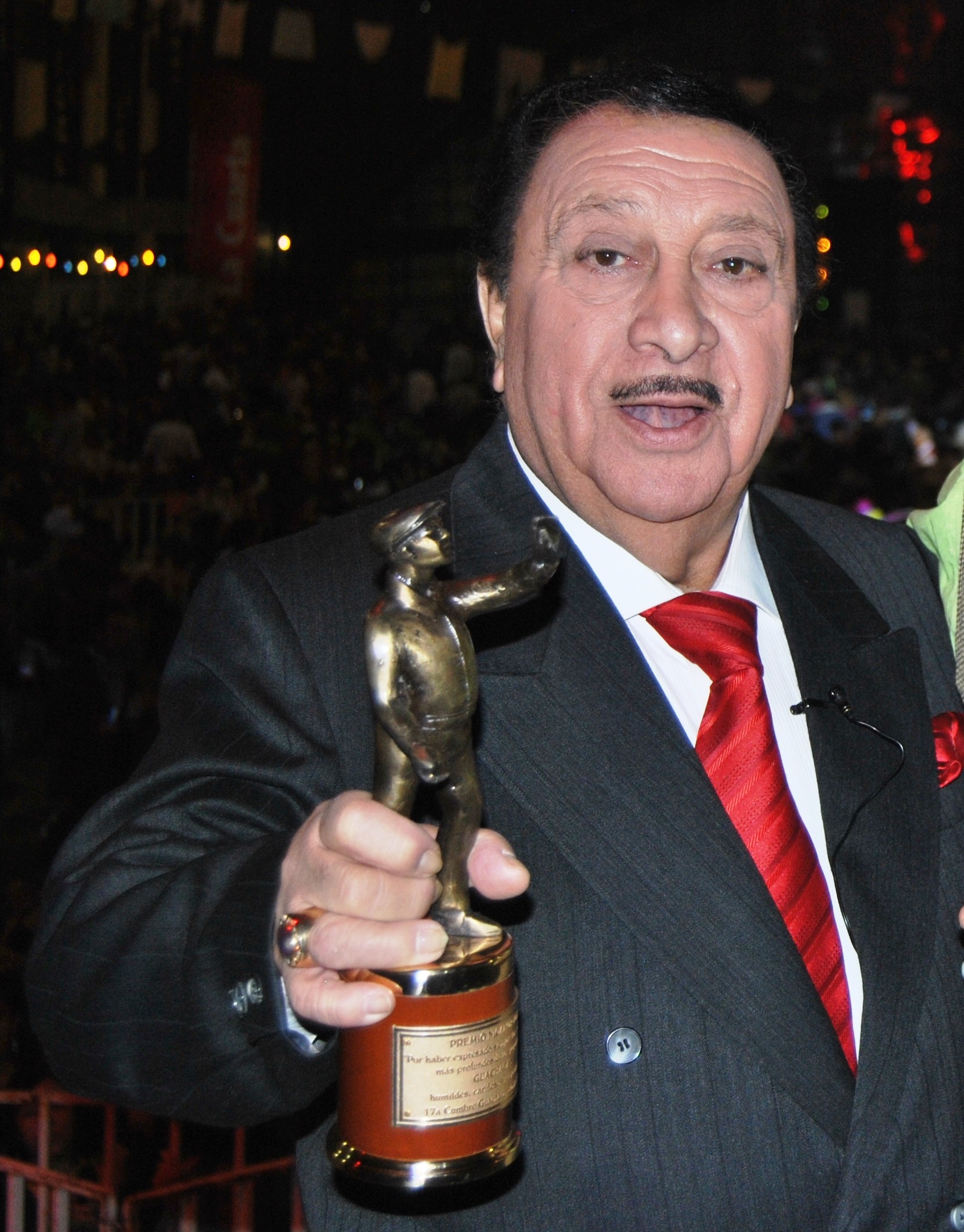 José Daniel Vilches Rojas1 , más conocido como Daniel Vilches (* Concepción 1931) es un actor y humorista chileno llamado "el académico de la lengua"1 , dedicado a los espectáculos de revista..